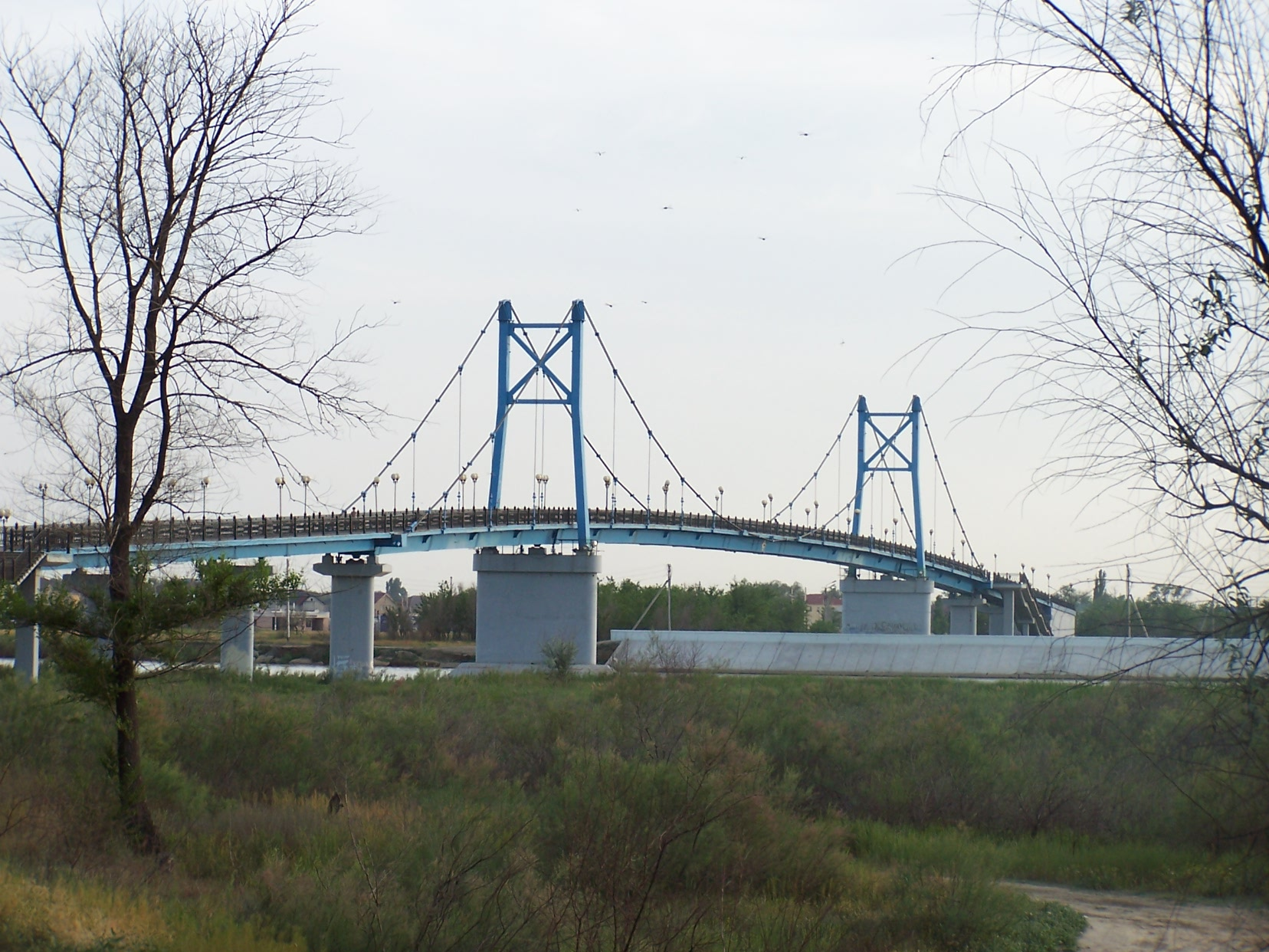 Atyrau, Kazakhstan